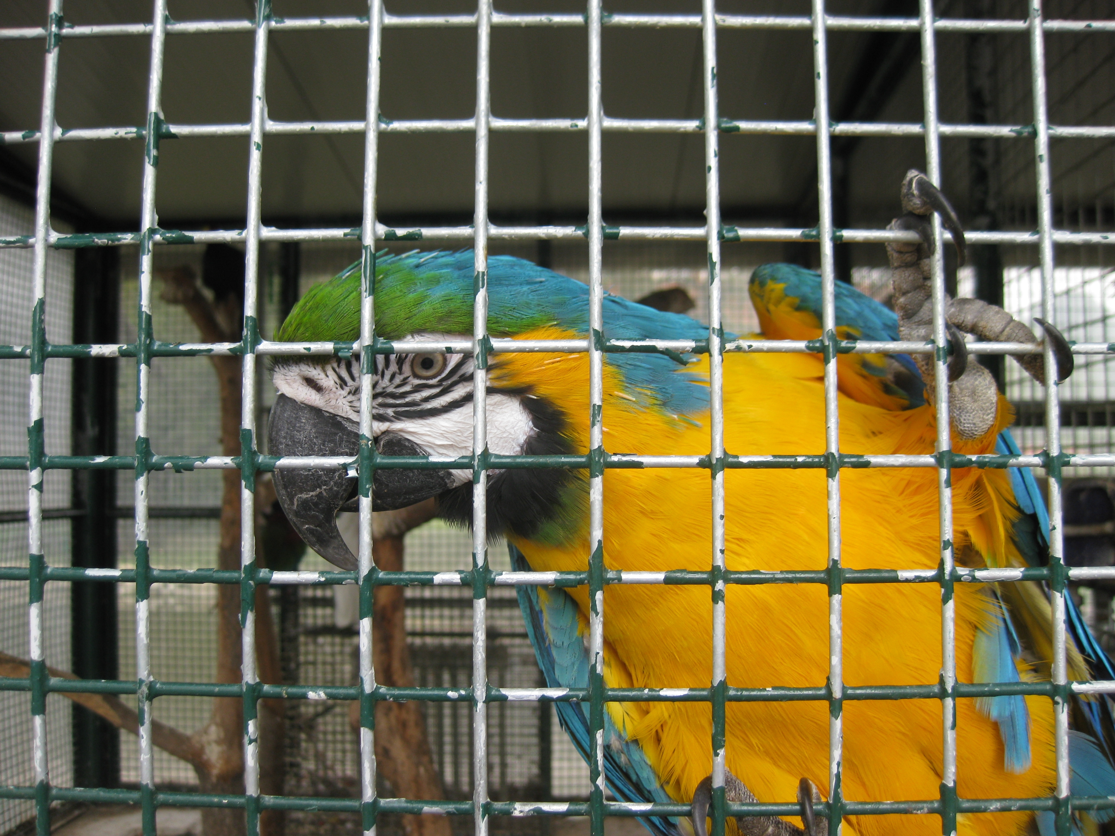 Un pappagallo all'Oasi San Raffaele - Milano